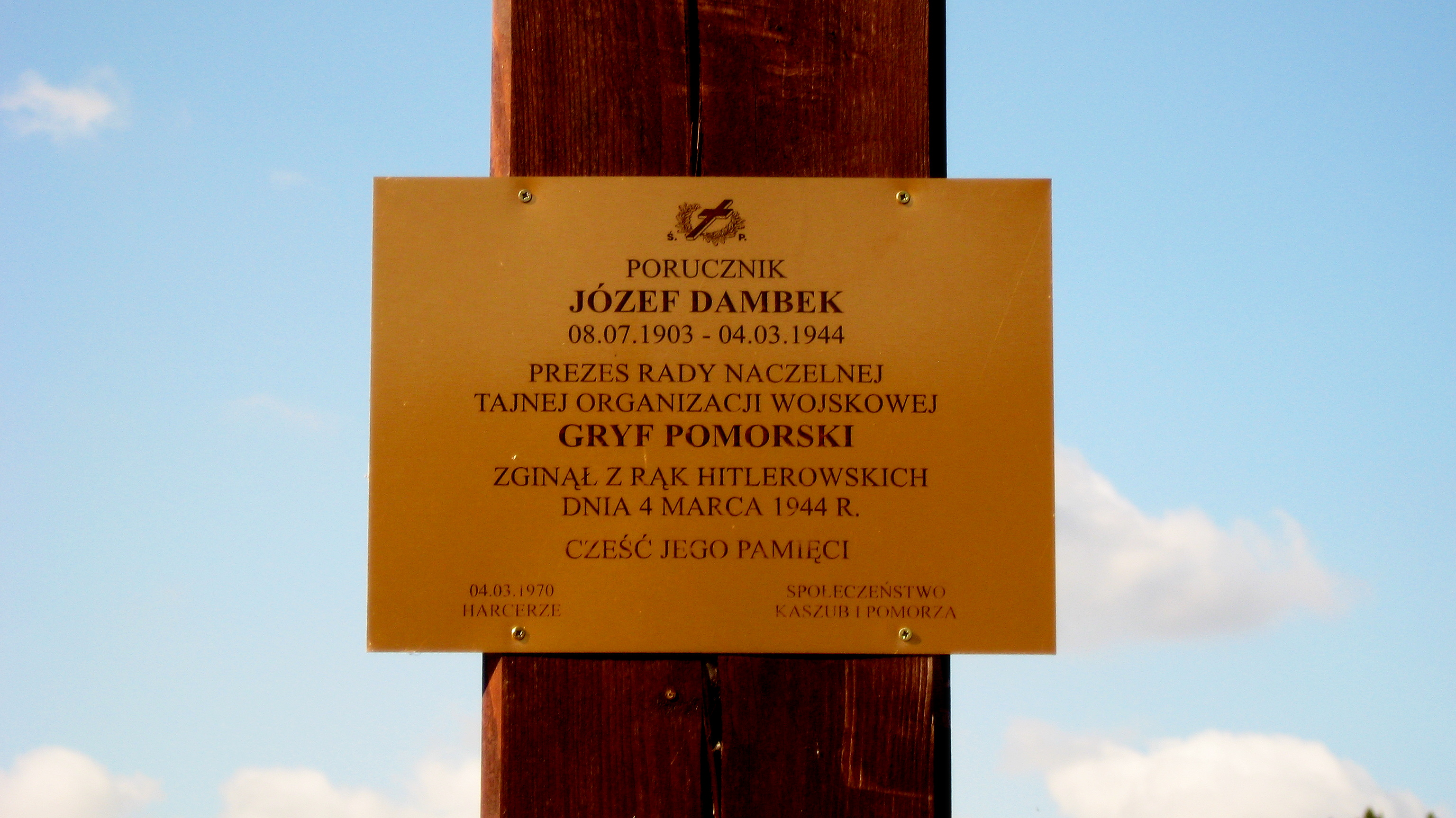 Krzyż upamiętniający porucznika Józefa Dambka / Gryf Pomorski / położenie Jezioro Dąbrowskie